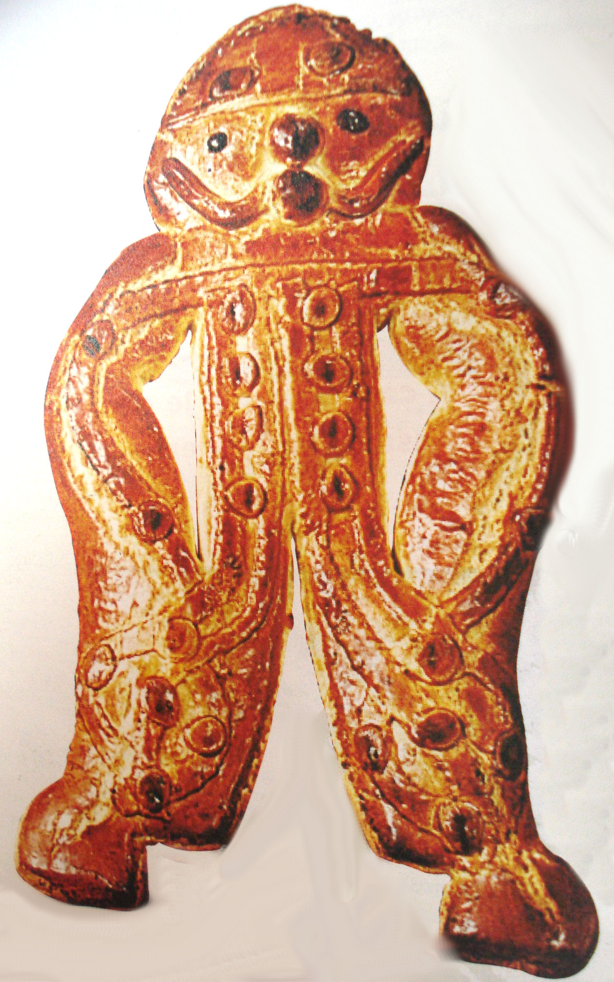 suisse, biscuit fabriqué à Valence dans la Drôme